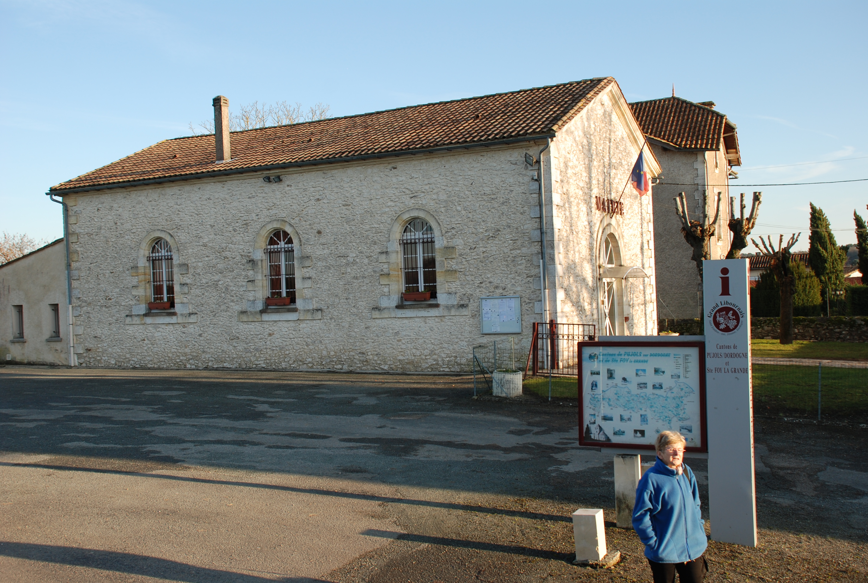 Mairie de La Roquille; (Gironde) Ancien temple protestant reconverti en mairie dans les années 1970